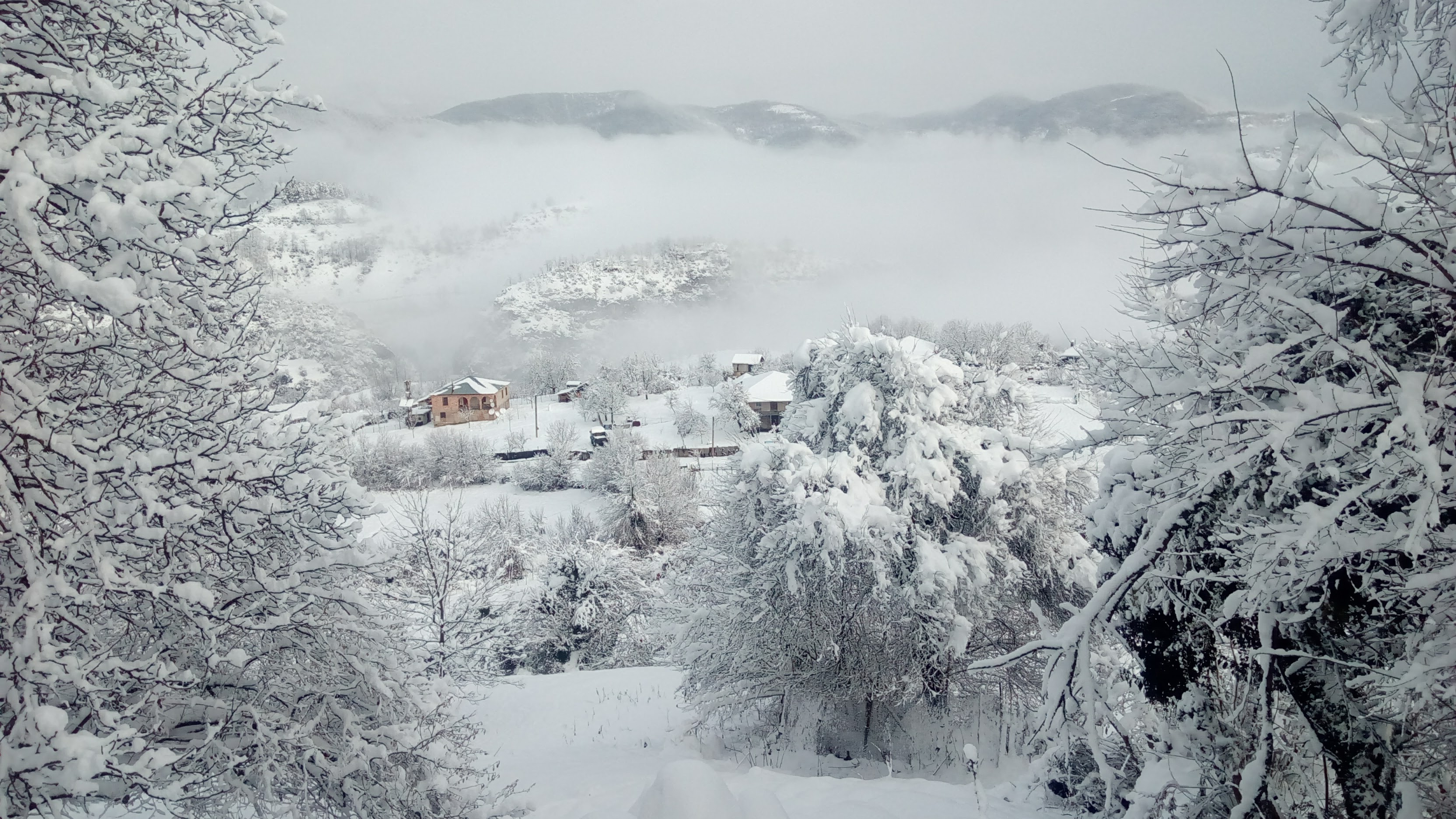 სოფ. ზოდის ჩრდილოეთ ნაწილის ხედი